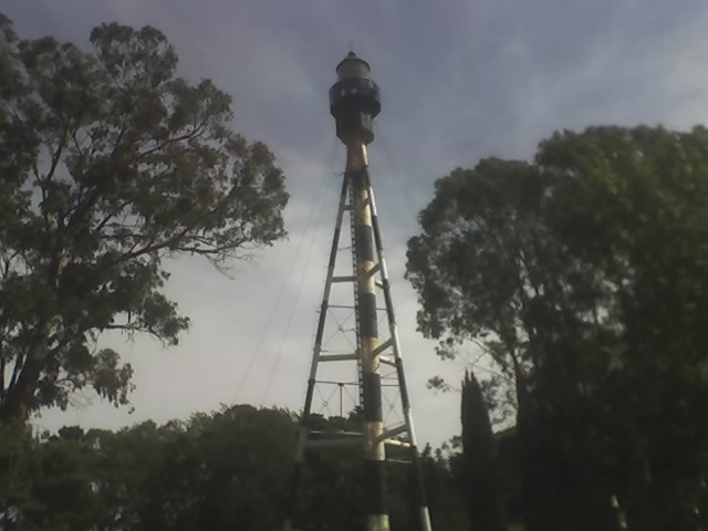 Vista del Faro San Antonio, en San Clemente del Tuyú. El tubo central contiene un elevador o ascensor por el cual se accede al faro.